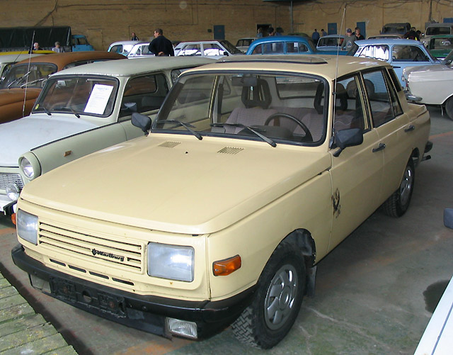 Beschreibung: Wartburg 353 Fotograf: Darkone, 3. Juli 2004